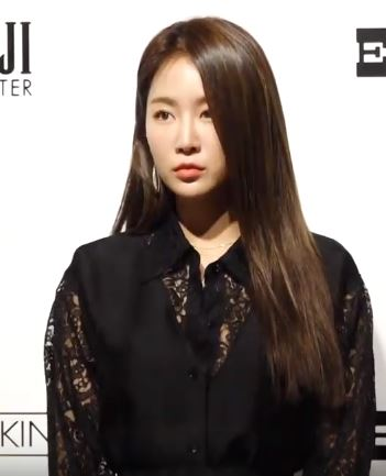 차예련, 소유와 효민이 17일 오후 서울시 강남구 청담동 분더샵에서 열린 한 브랜드의 포토행사에 참석했다.